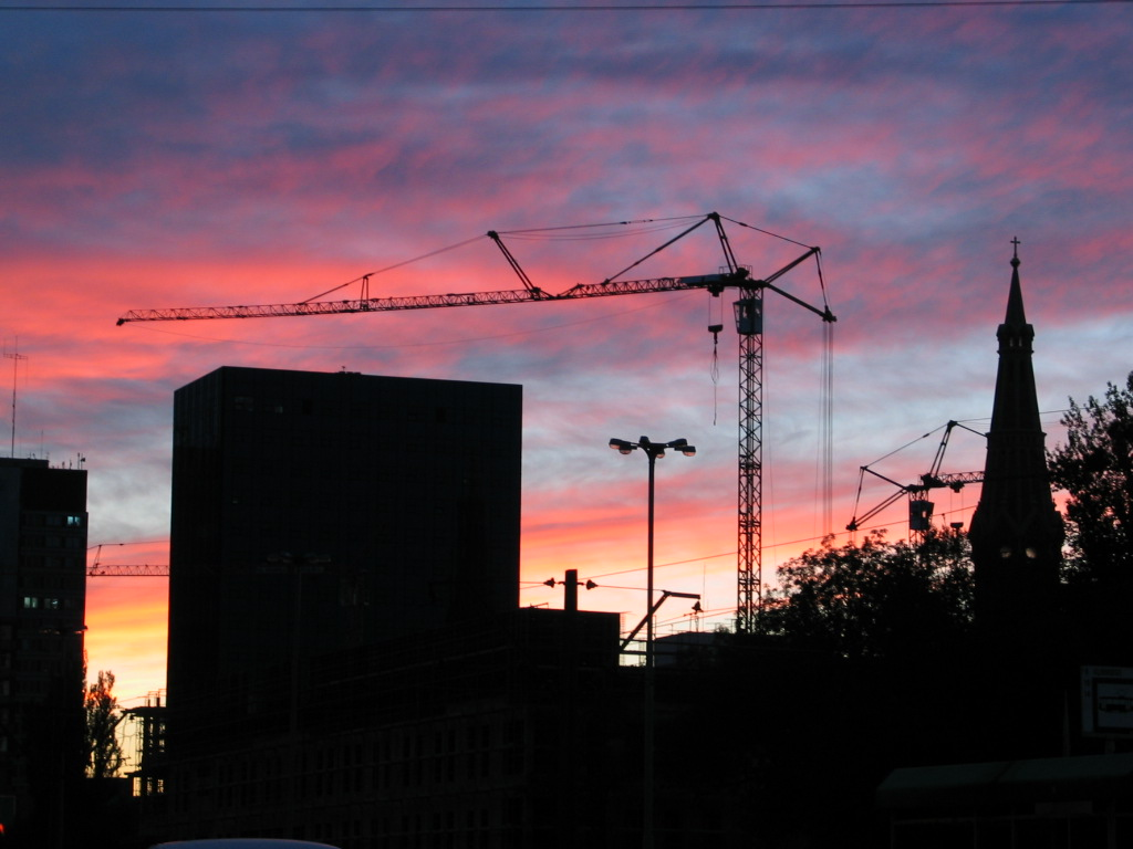 Budowa Philipsa w Łodzi. Aleja Piłsudskiego.